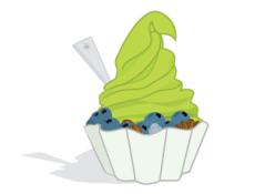 Familia de Android